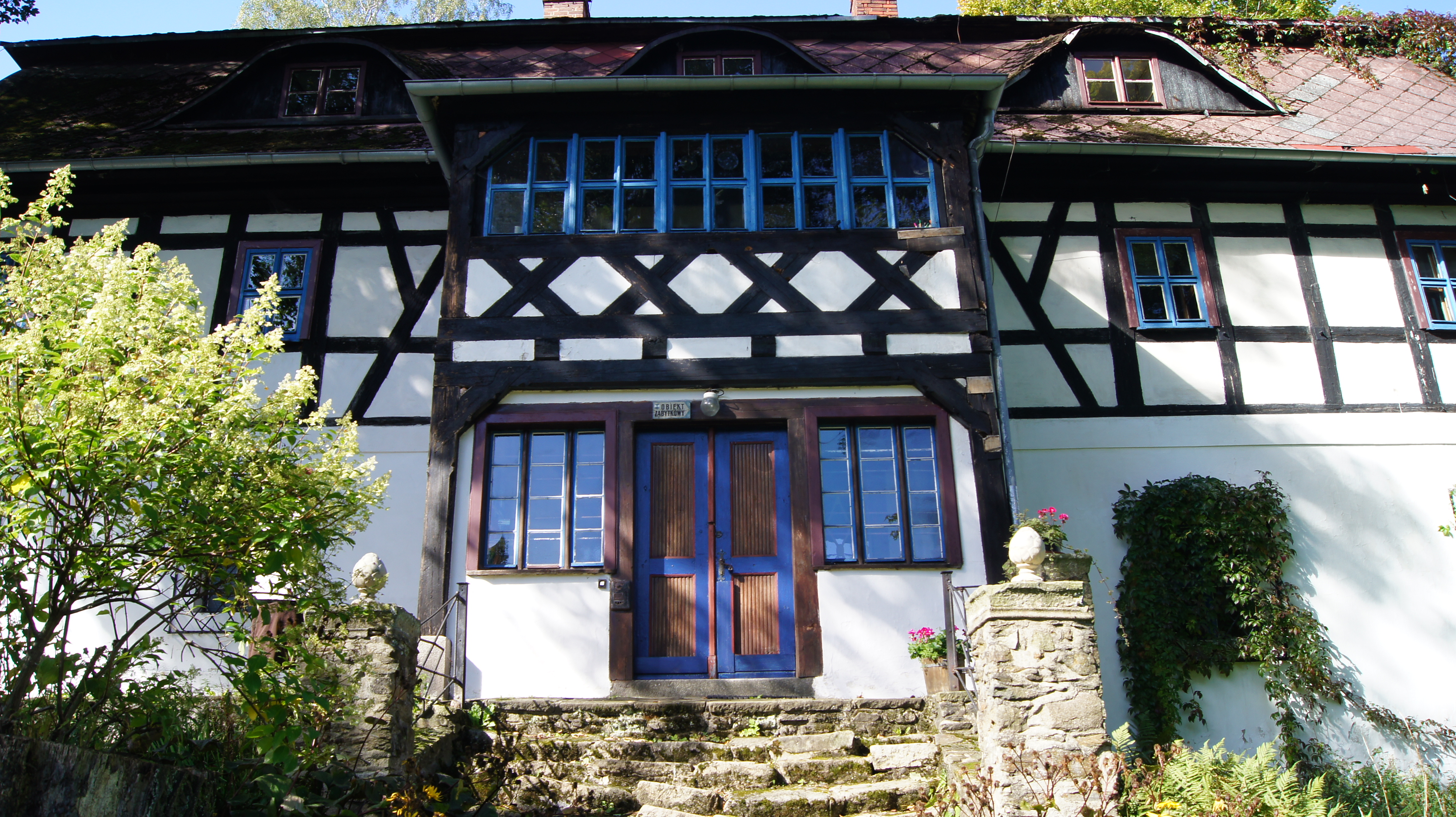 Mniszków 17 - dwór (zabytek nr rejestr. A/913/605/J)